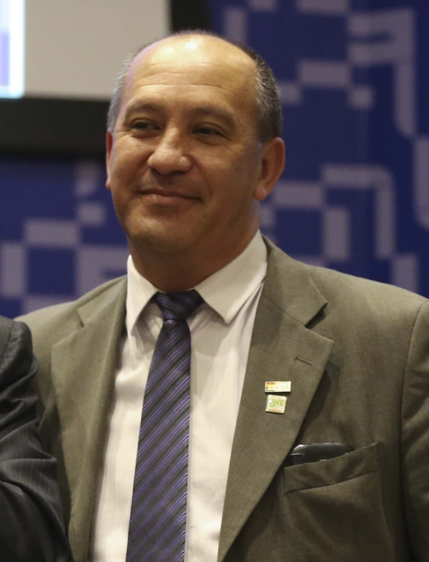 Brasília - O ativista de direitos humanos Toni Reis na abertura do seminário Sinaeb e o Plano Nacional de Educação (Valter Campanato/Agência Brasil)